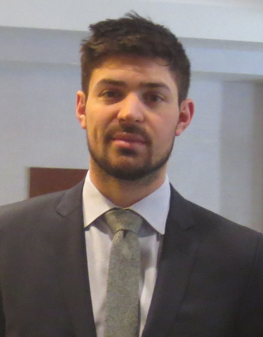 Le joueur de hockey canadien Carey Price en 2015.